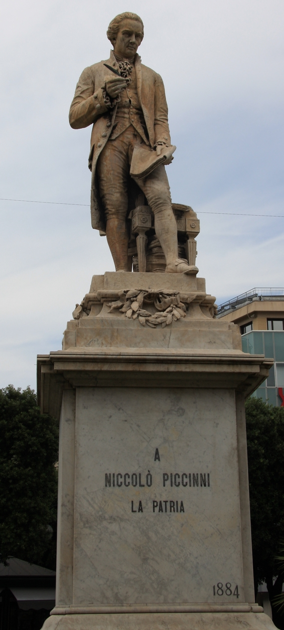 Statue de Niccolo Piccinni - Bari